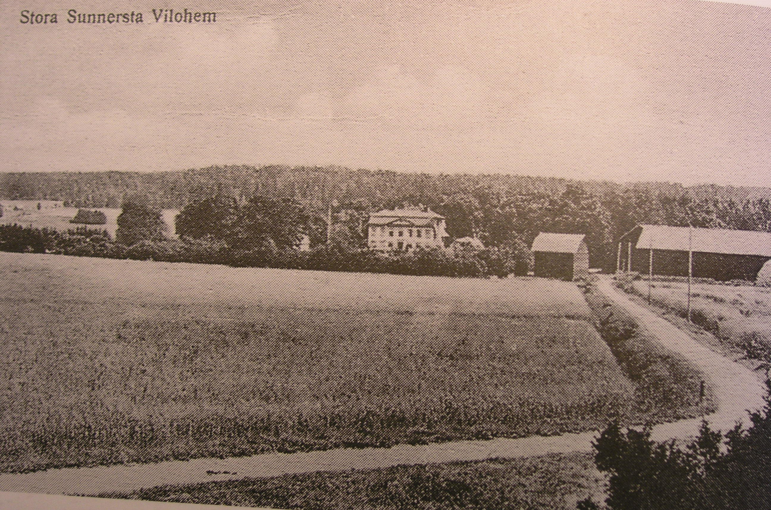 Sunnersta herrgård 1800-talet